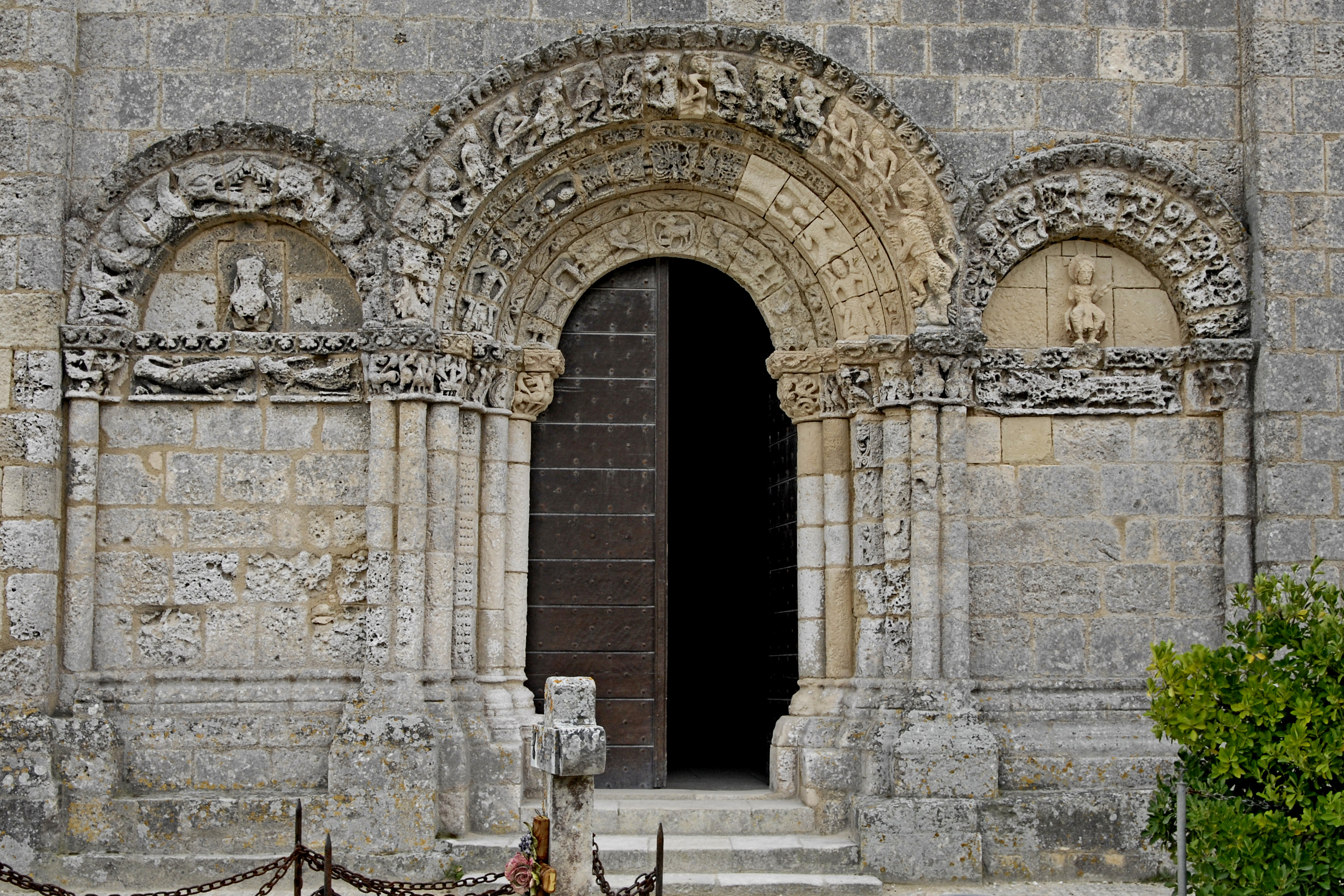 Sainte-Radegonde-Talmont-sur-Gironde, Erdgeschoss Nordfassade